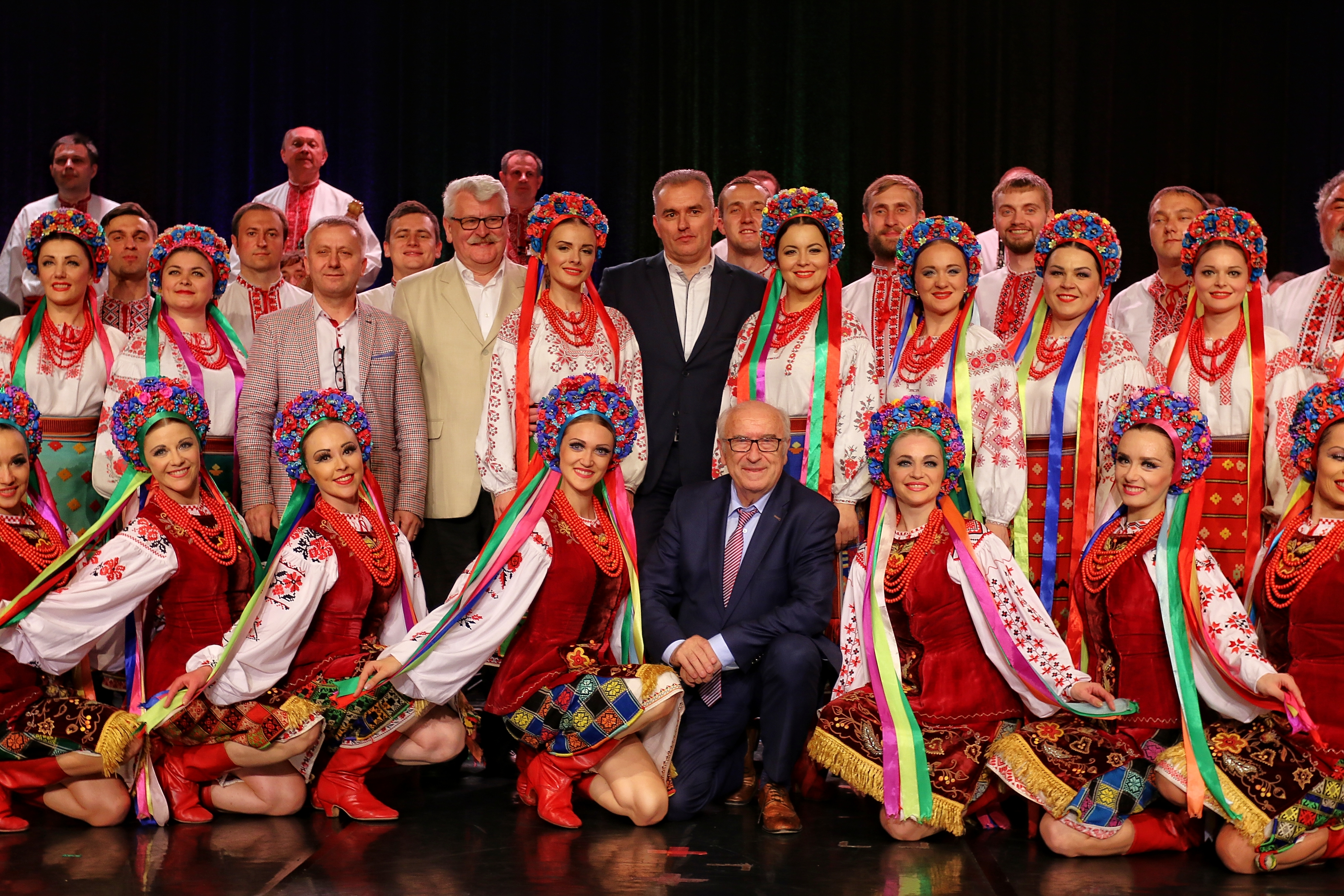 Narodowy Zespół Pieśni i Tańca Ukrainy im. G. Wierowki z Kijowa po koncercie w MCC Mazurkas Conference Centre w Ożarowie Mazowieckim